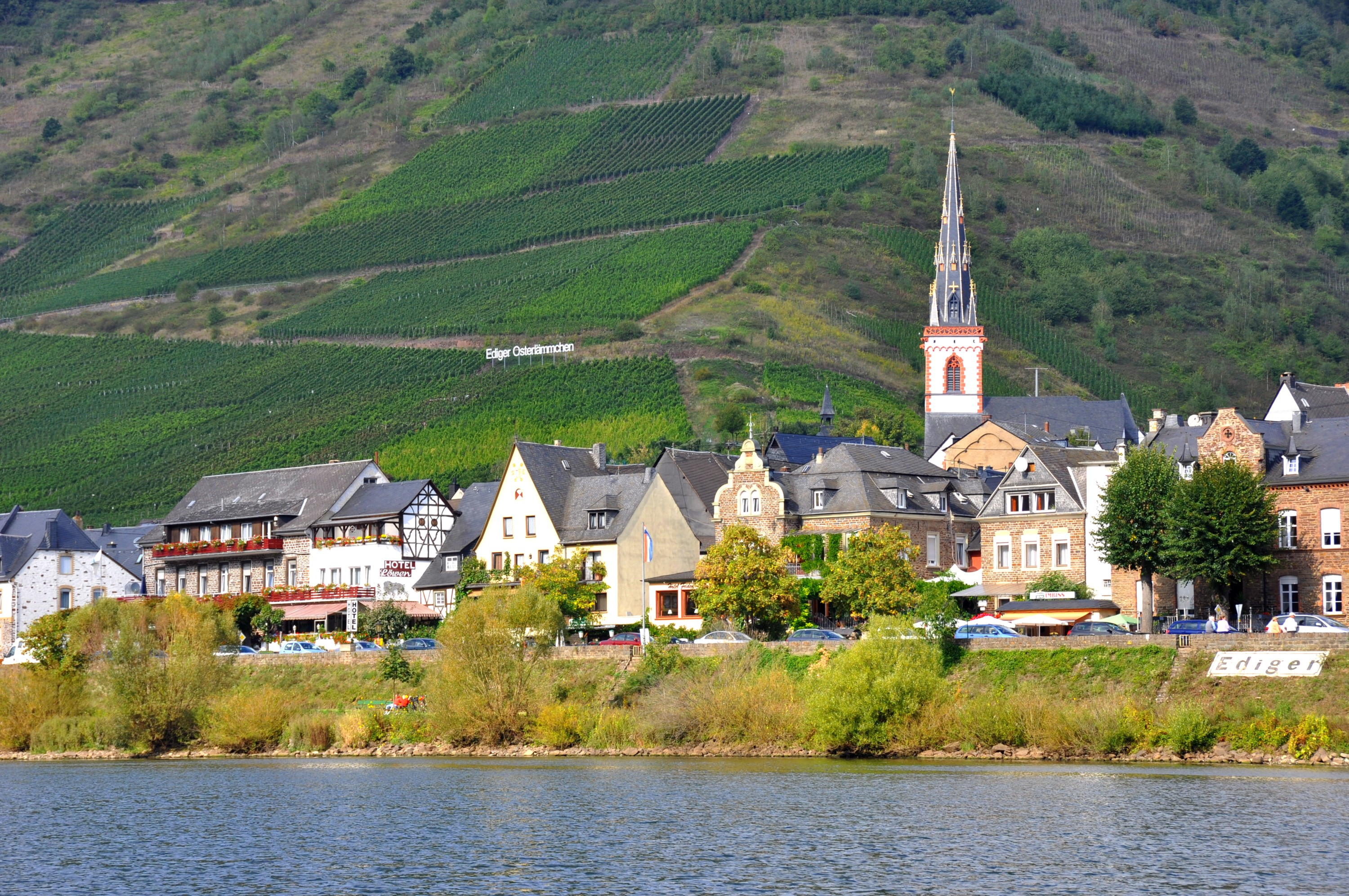 Ediger mit Kirche und Weinlage „Ediger Osterlämmchen“